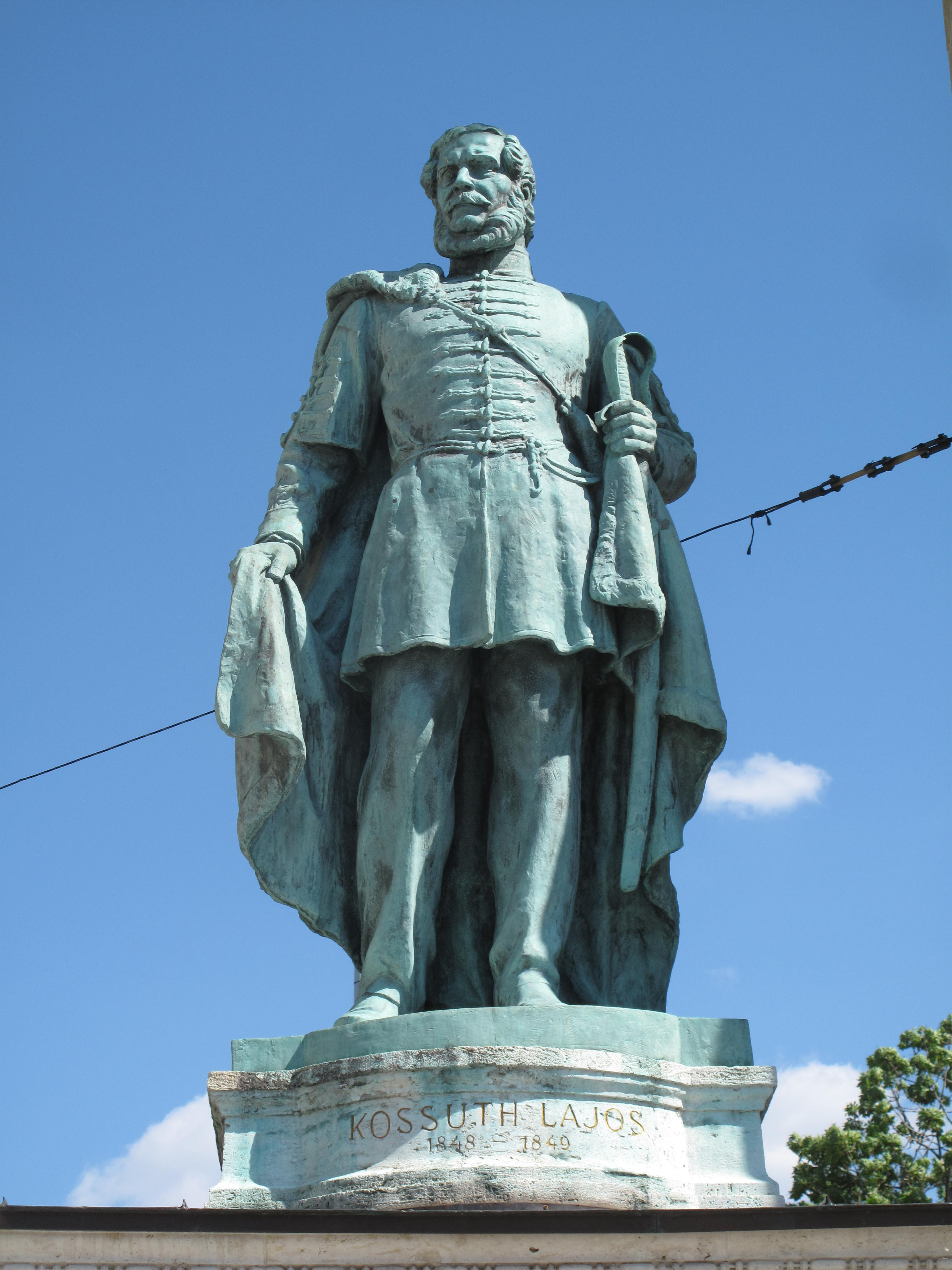 Náměstí Hrdinů, Budapešť